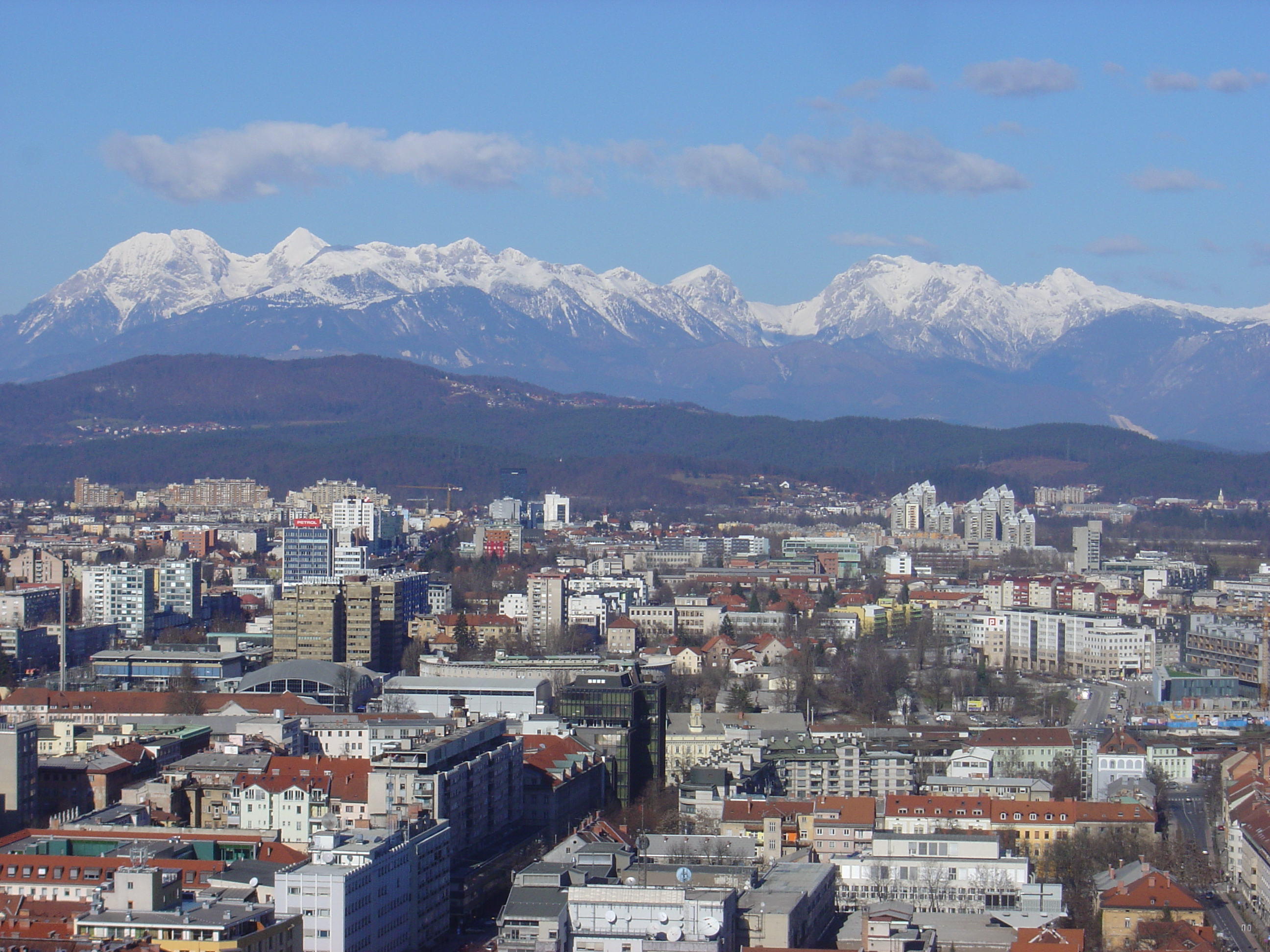 Bežigrad, Ljubljana, Slovenia